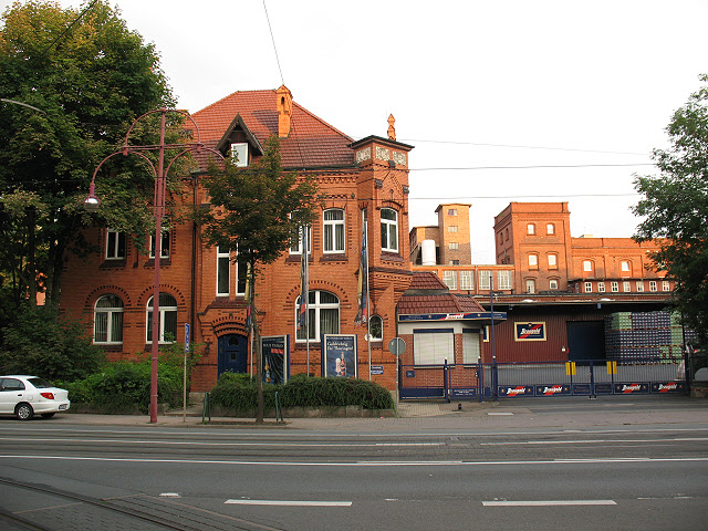 Brauerei Braugold (Braugold brewery)